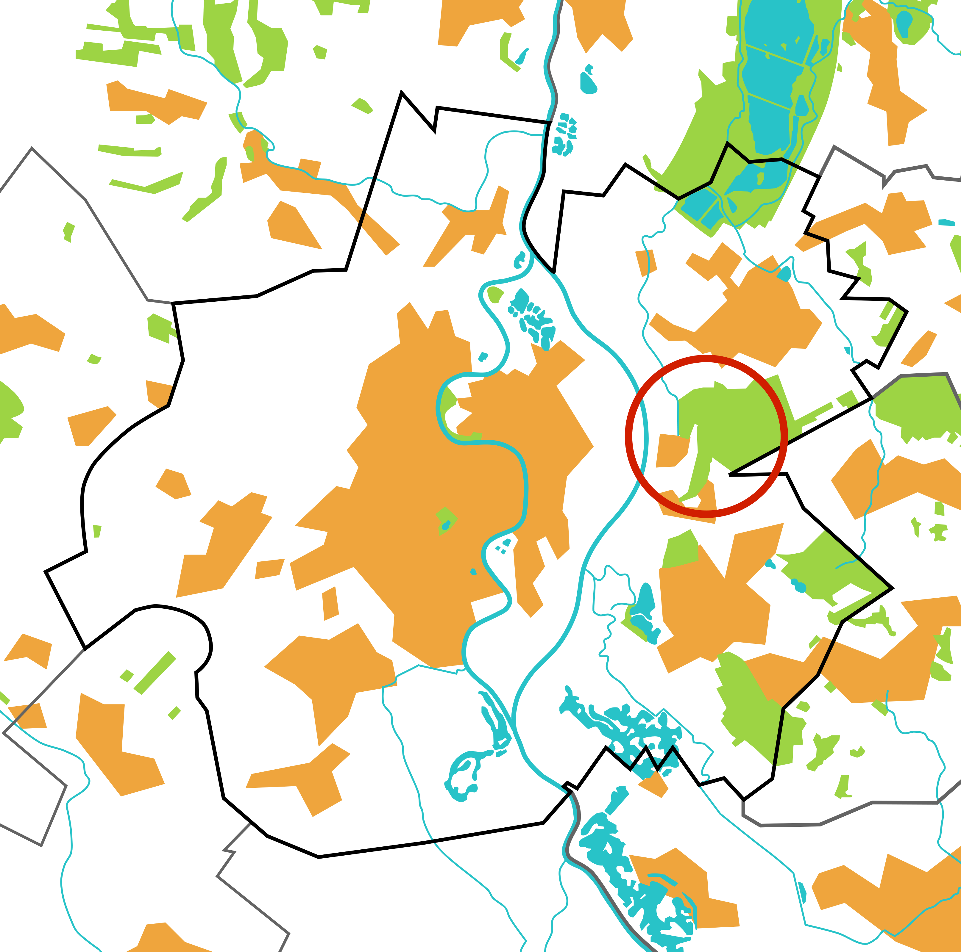 Plan Raciborza z zaznaczoną lokalizacją dzielnicy Obora